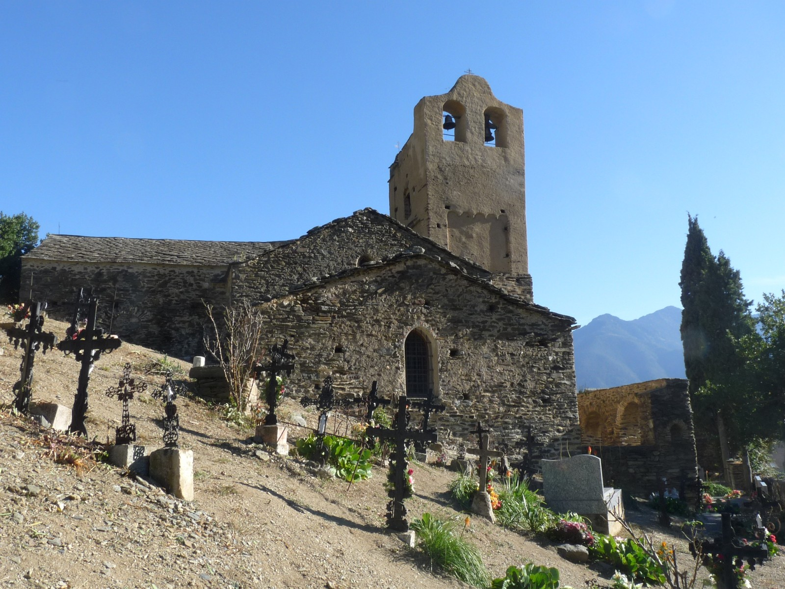 Eglise d'Evol, Pyrénées-Orientales, France